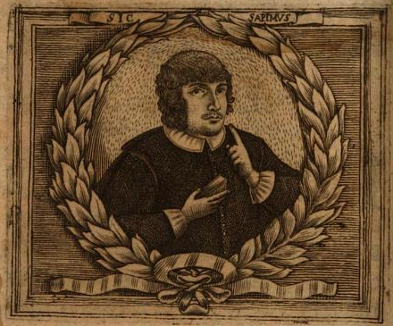 ritratto di Cesare Fanelli